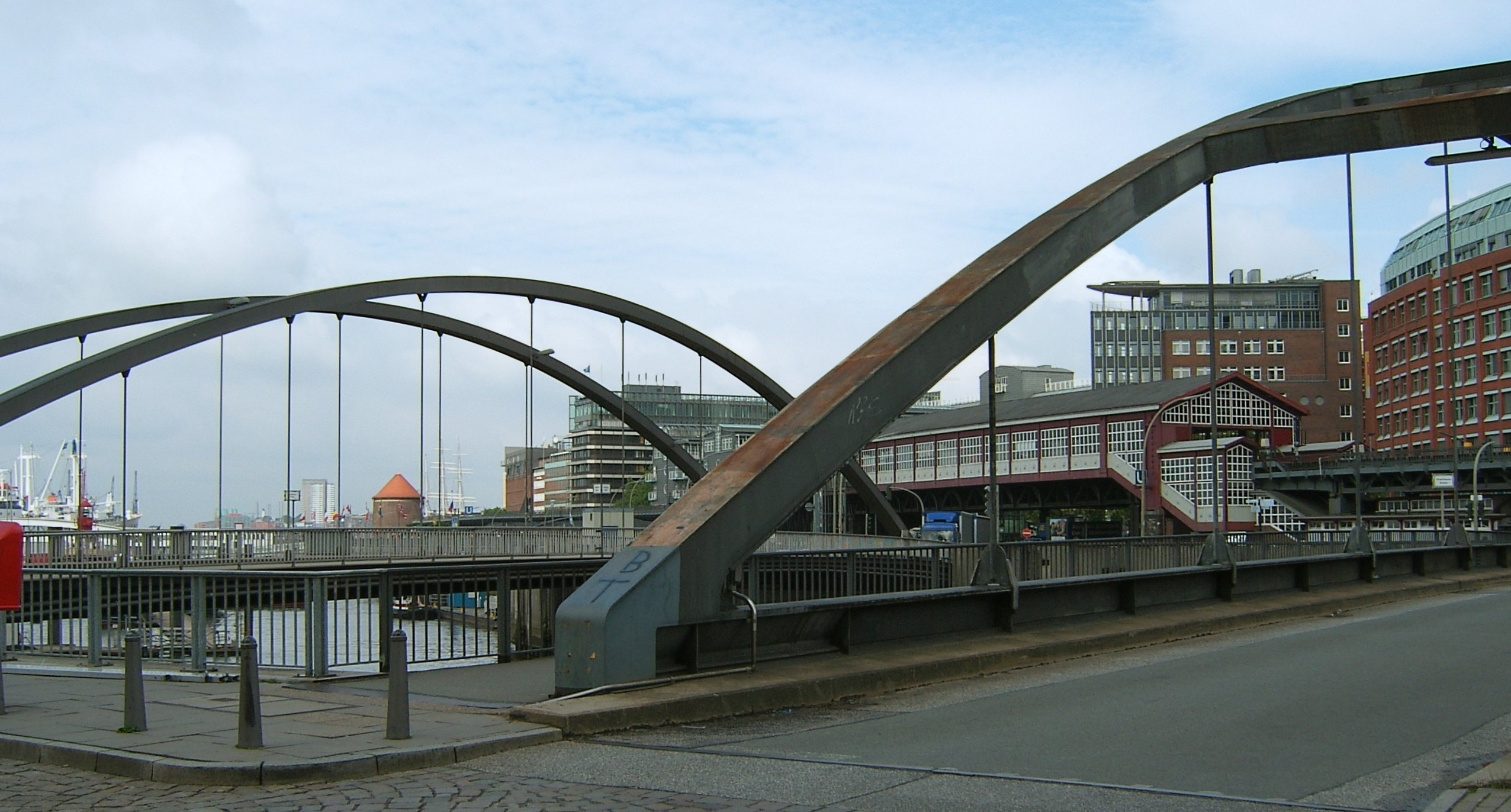 Die beiden Brücken der Niederbaumbrücke wurden 1978 erbaut und verbinden das zur Hamburger Neustadt gehörende Festland in Höhe der U-Bahn-Haltestelle Baumwall mit der zur Altstadt zählenden ehemaligen Insel Kehrwieder. Sie bilden zugleich die Grenze zwischen Niederhafen und Binnenhafen.